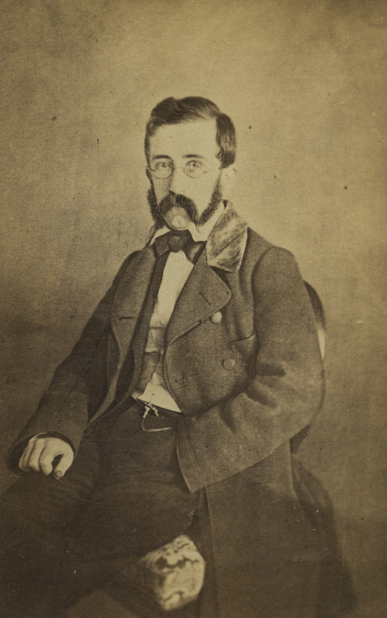 Portret Wilhelma Kolberga